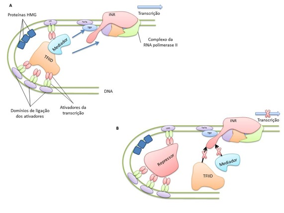 (A) Os ativadores da transcrição vão se ligar aos seus domínios de ligação, interagindo com mediadores e fatores de transcrição, formando uma alça de DNA com a participação das proteínas HMG (high mobility group) e aumentando a estabilidade da ligação da maquinaria da RNA polimerase com o DNA. (B) Moléculas repressoras irão interagir com os ativadores da transcrição ou com os mediadores, impedindo a formação da maquinaria da transcrição, diminuinto ou até inibindo a transcrição do mRNA.